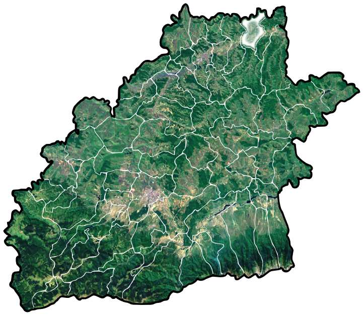 Dumbraveni jud Sibiu.